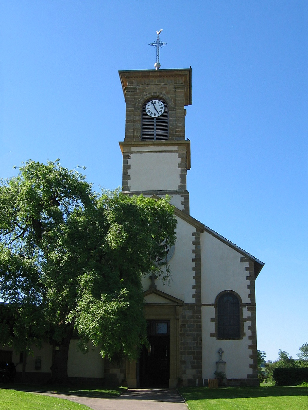 Église Saint-Remy